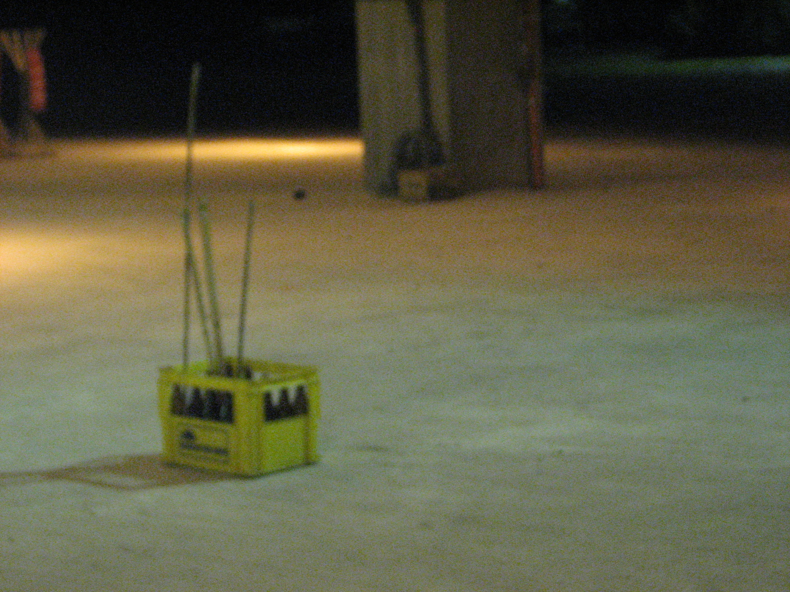 中文（台灣）: 太巴塱伊利幸會場上的祖固(長者)與密夫夫(短者)